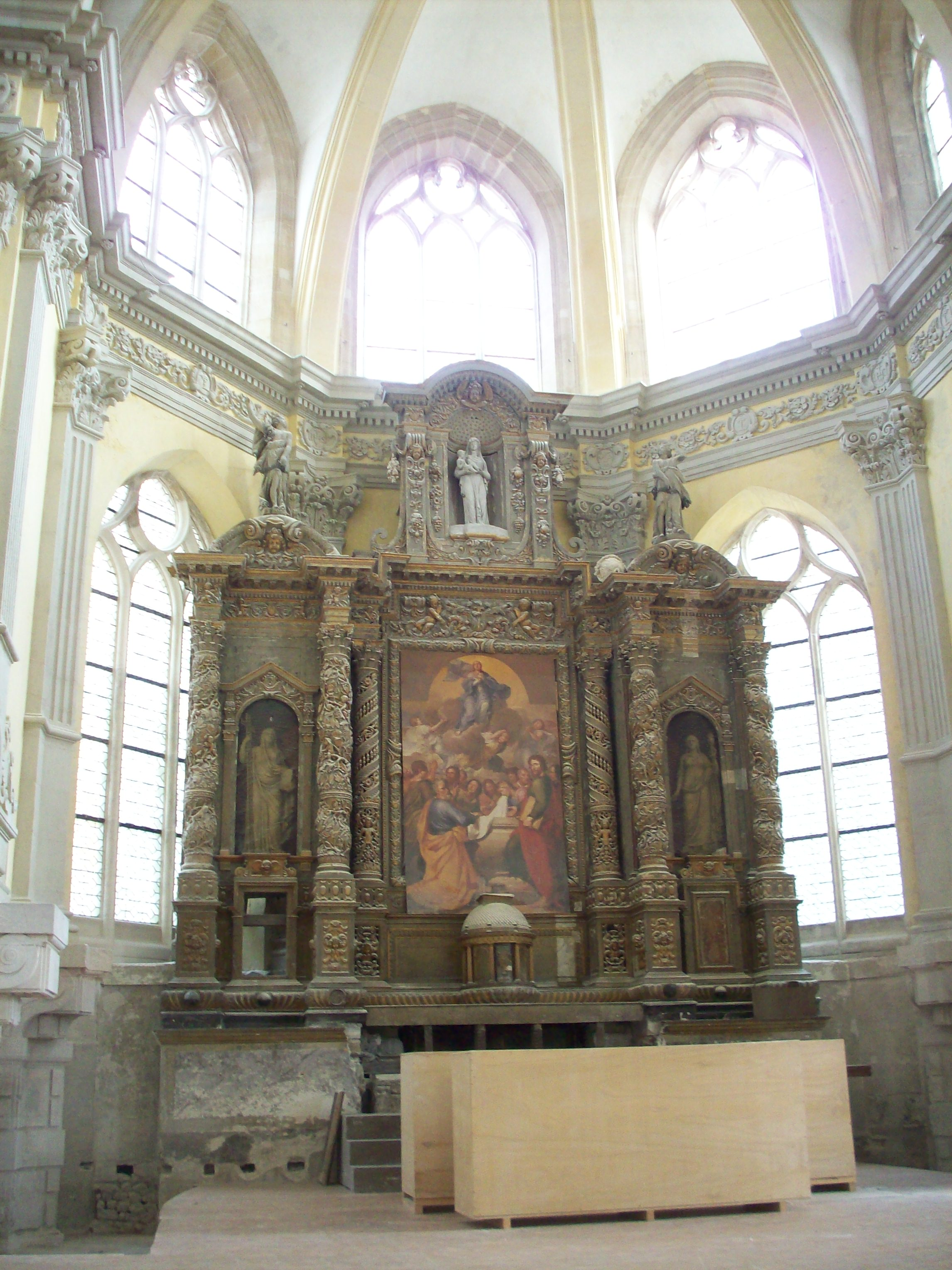 Choeur de l'église St Louis.